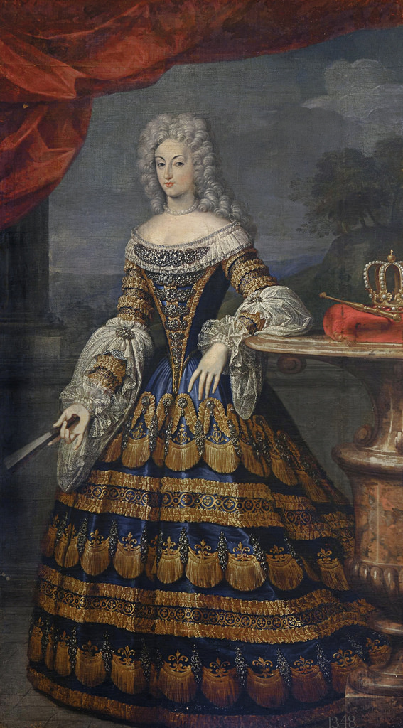 Retrato de la reina Mariana de Neoburgo (1667-1740), que fue reina consorte de España por su matrimonio con el rey Carlos II de España. La reina aparece repesentada de cuerpo entero, en una galería abierta a un paisaje. En la mano derecha sostiene un abanico plegado, mientras que acoda su brazo izquierdo sobre un velador de mármol rojo, en el que reposa un cojín con la corona y el cetro, que señalan su condición regia, así como el cortinaje rojo y la columna que se aprecian tras ella.